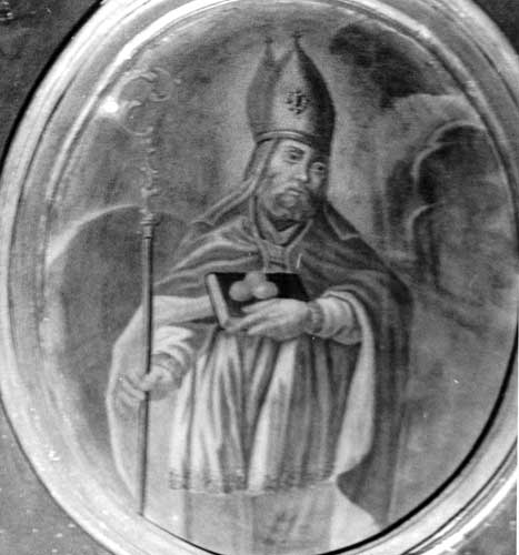 Абраз святога Мікалая. XIХ ст. Касцёл у в. Паланечка Баранавіцкага р-на